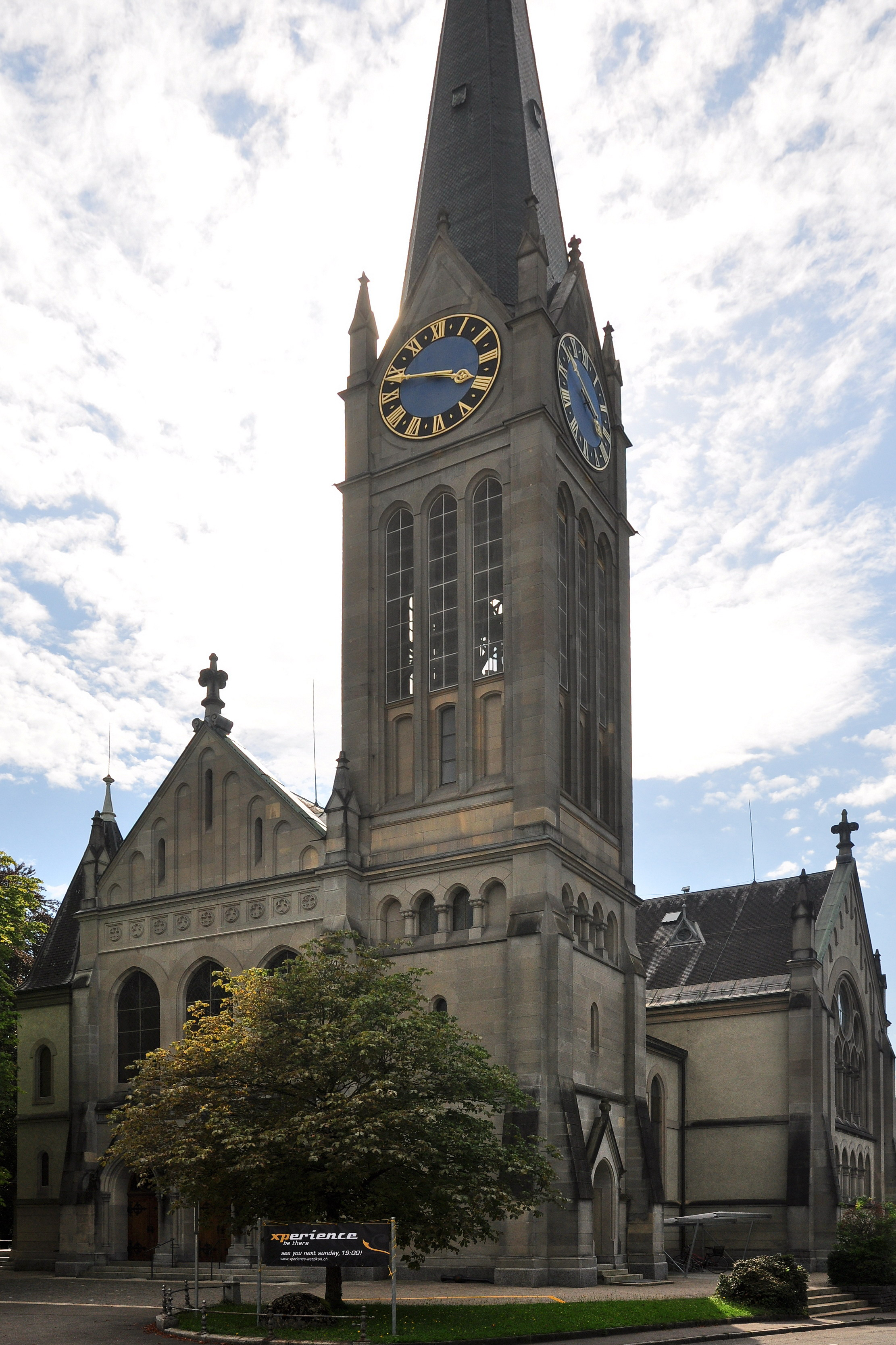 Reformierte Kirche in Wetzikon (Switzerland)